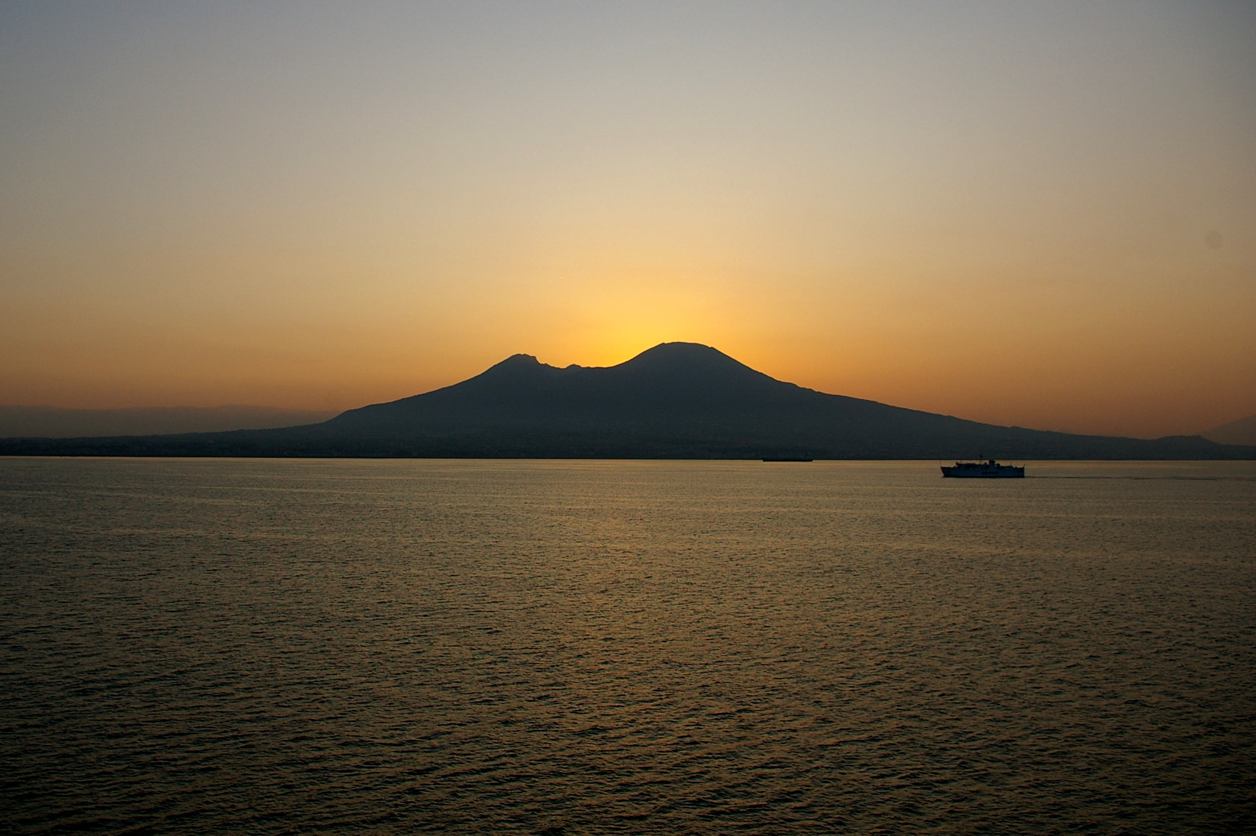 Vesuvio Sunrise